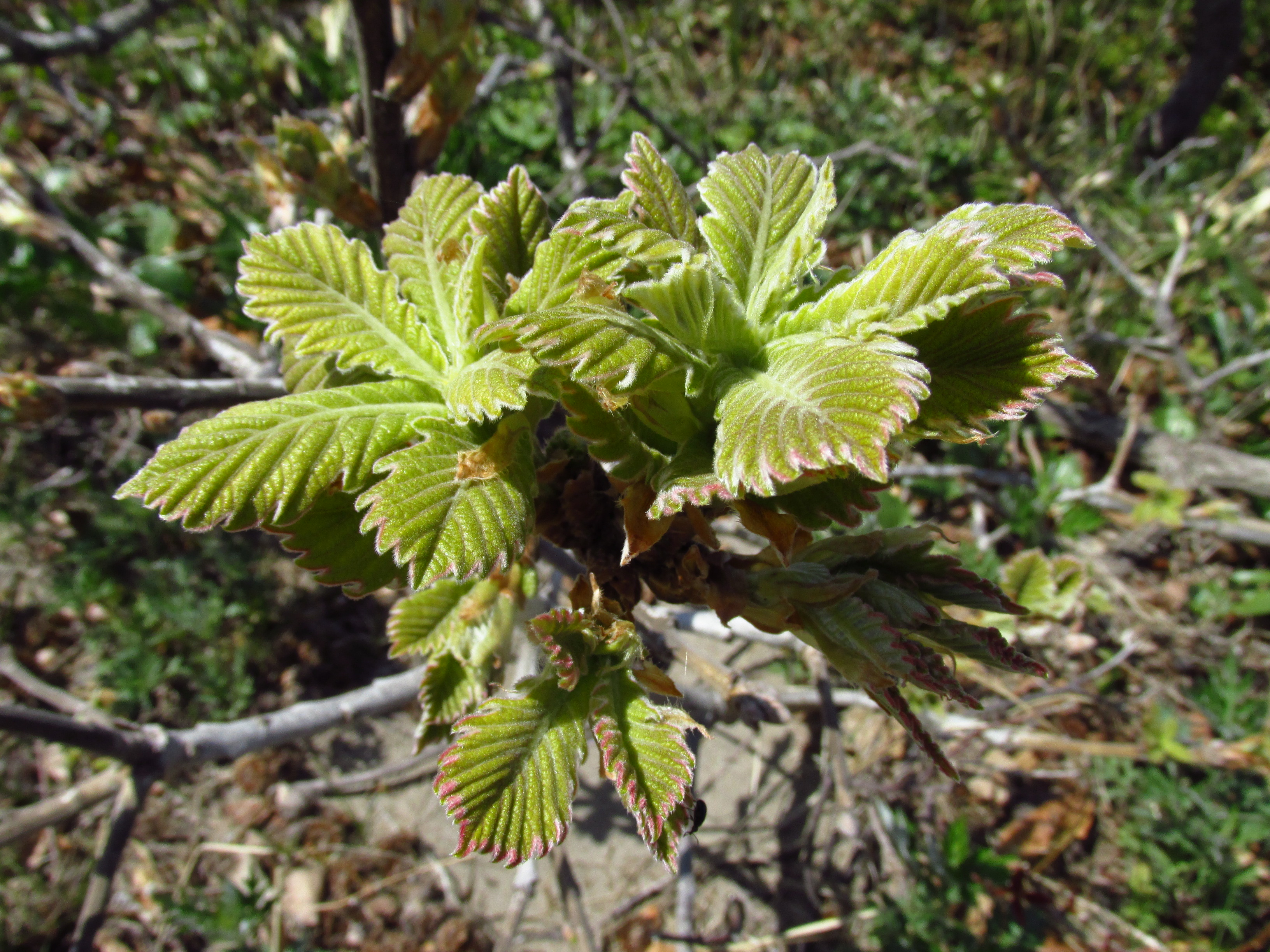 Quercus dentata , Daimyo Oak , カシワ（柏）, 若葉